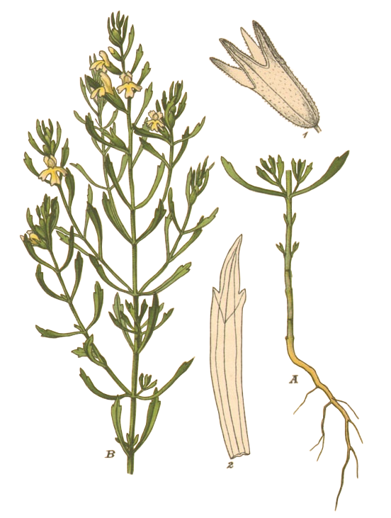 Euphrasia tricuspidata L.